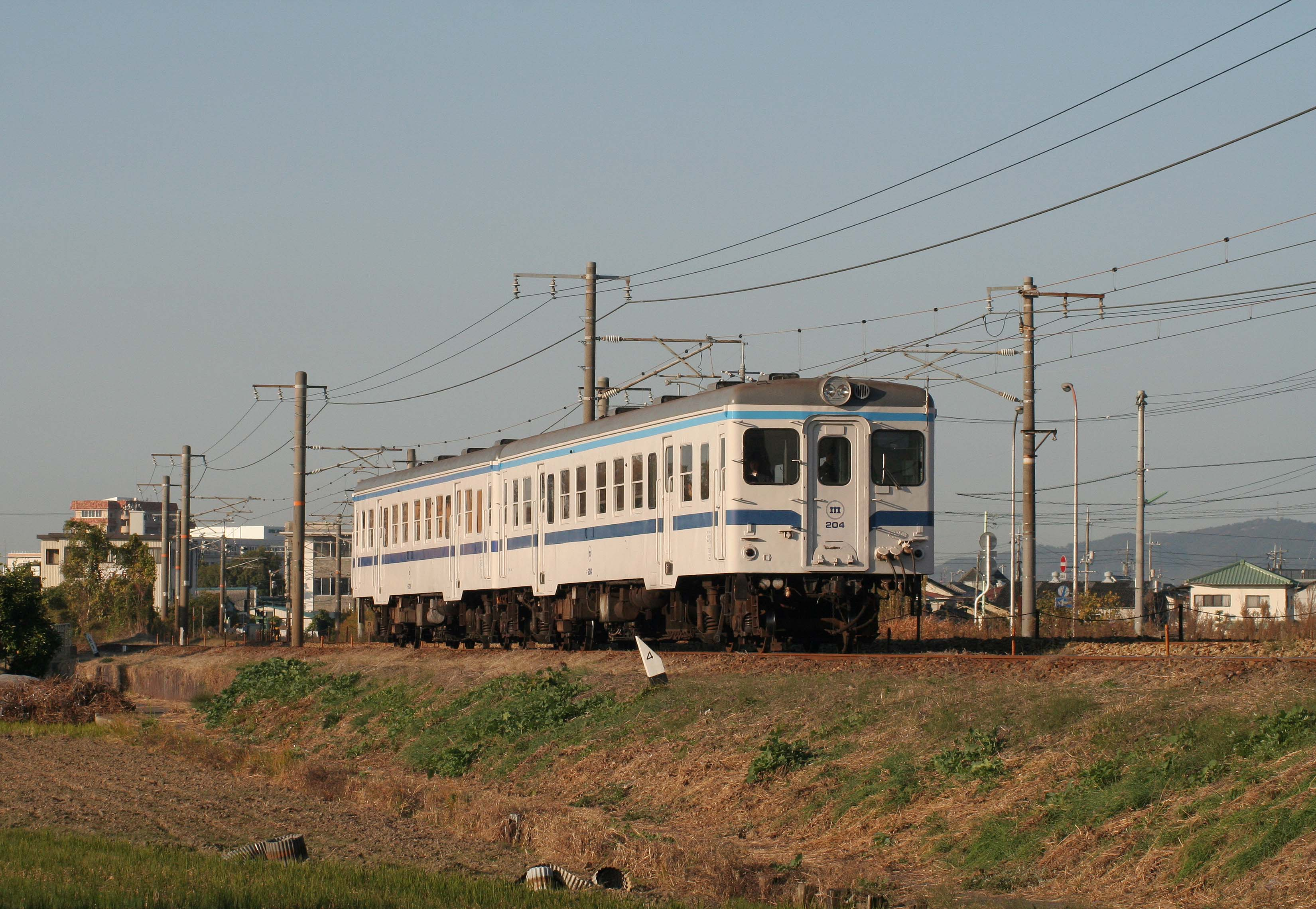 倉敷市～球場前間をJR山陽本線と平行して走行するキハ20形